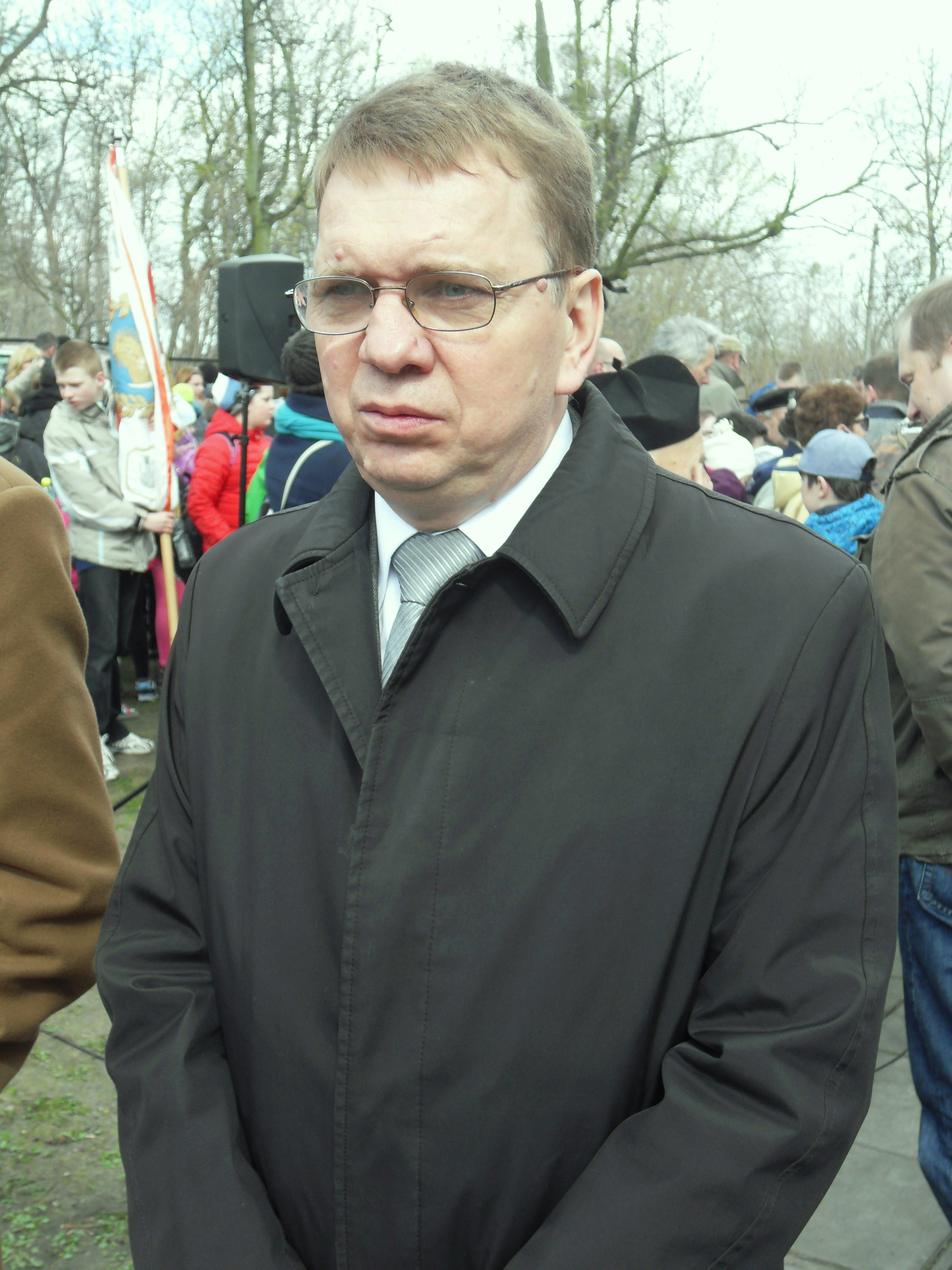 Prof. dr Mirosław Golon, historyk gdańskiego odziału IPN.